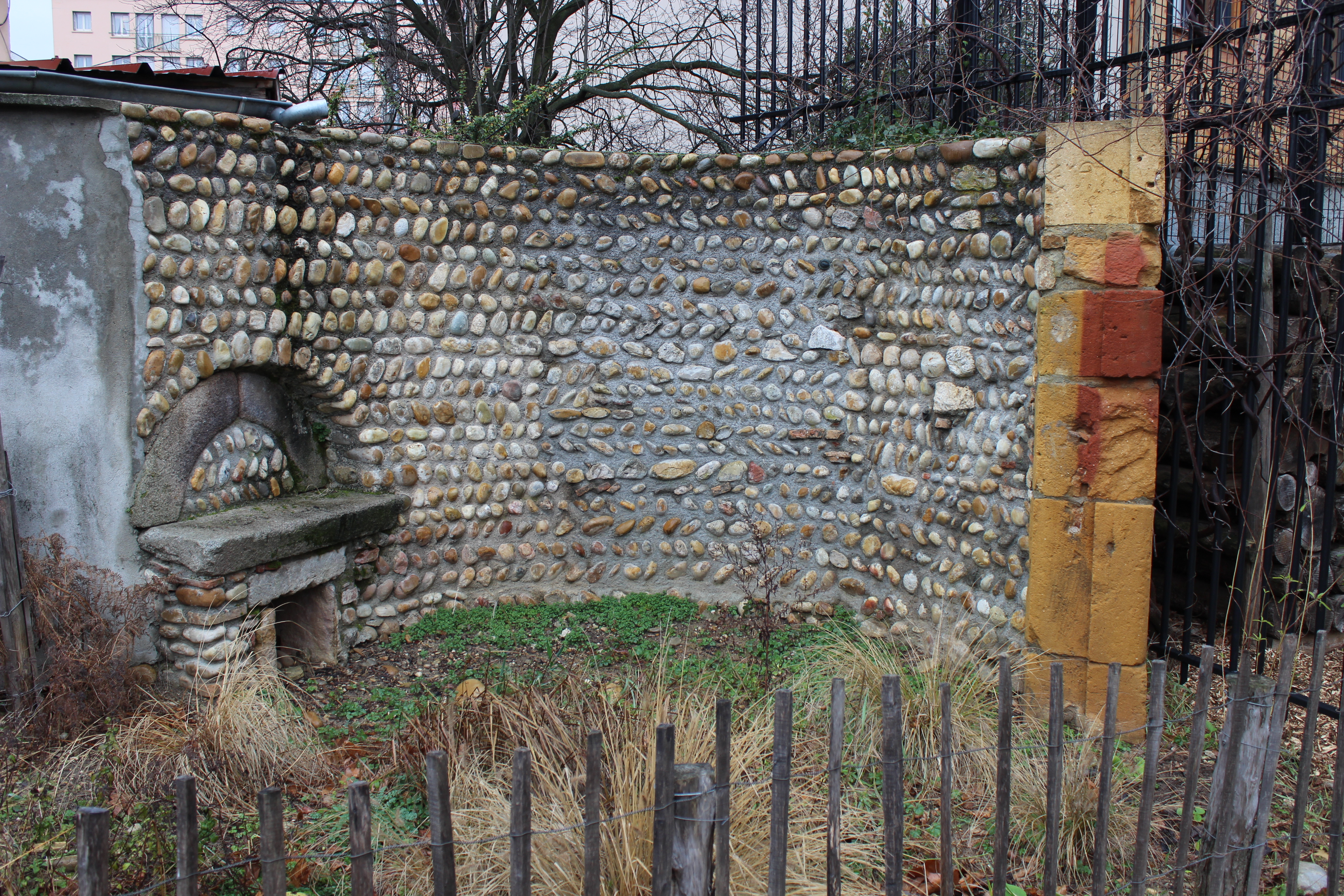 Vestiges d'une tour du Château Gaillard de Villeurbanne, détruit à la Révolution.